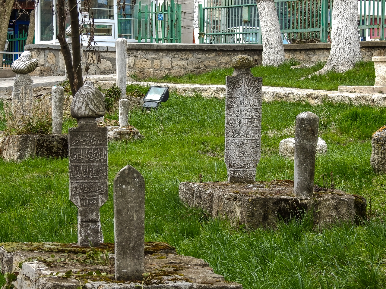 Cimitir musulman 02